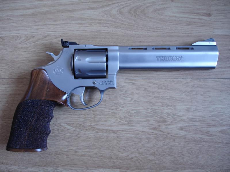 Taurus 627-KLM .357MAG (TRACKER)